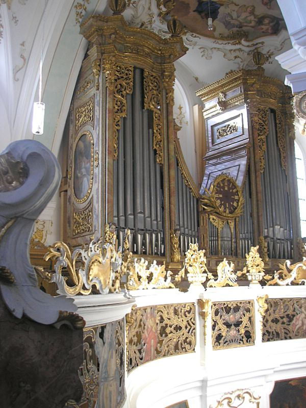 Wallfahrtskirche St. Maria (Andechs, Landkreis Starnberg, Oberbayern). Die Orgel. Eigene Aufnahme, Sept. 2006 / Andechs Monastery: Pilgrimage church of St. Mary, (Upper Bavaria, Germany). The organ. Own photo, Sept. 2006